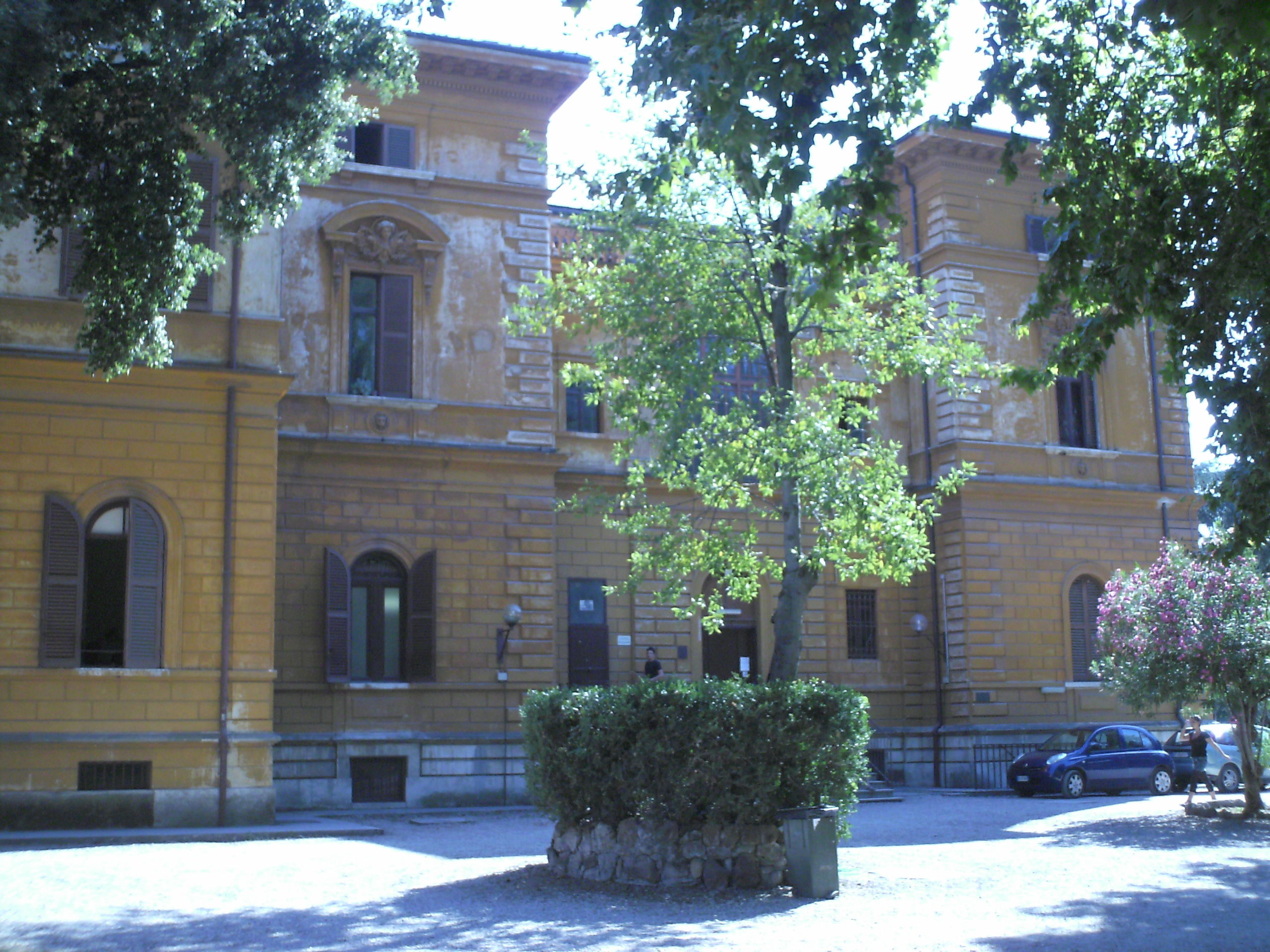 Villa Mirafiori, University La Sapienza, Rome